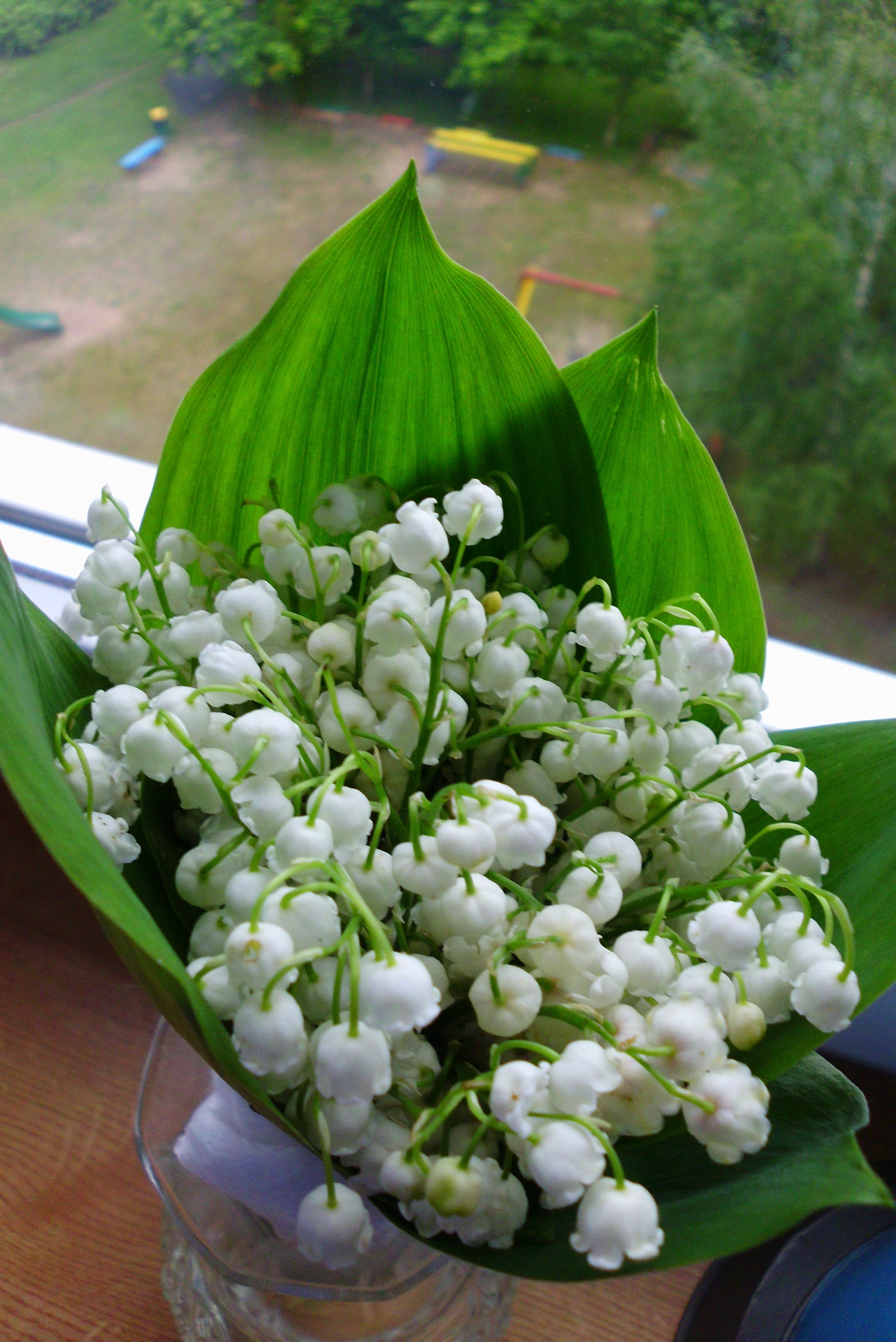 Convallaria majalis 18-05-2014